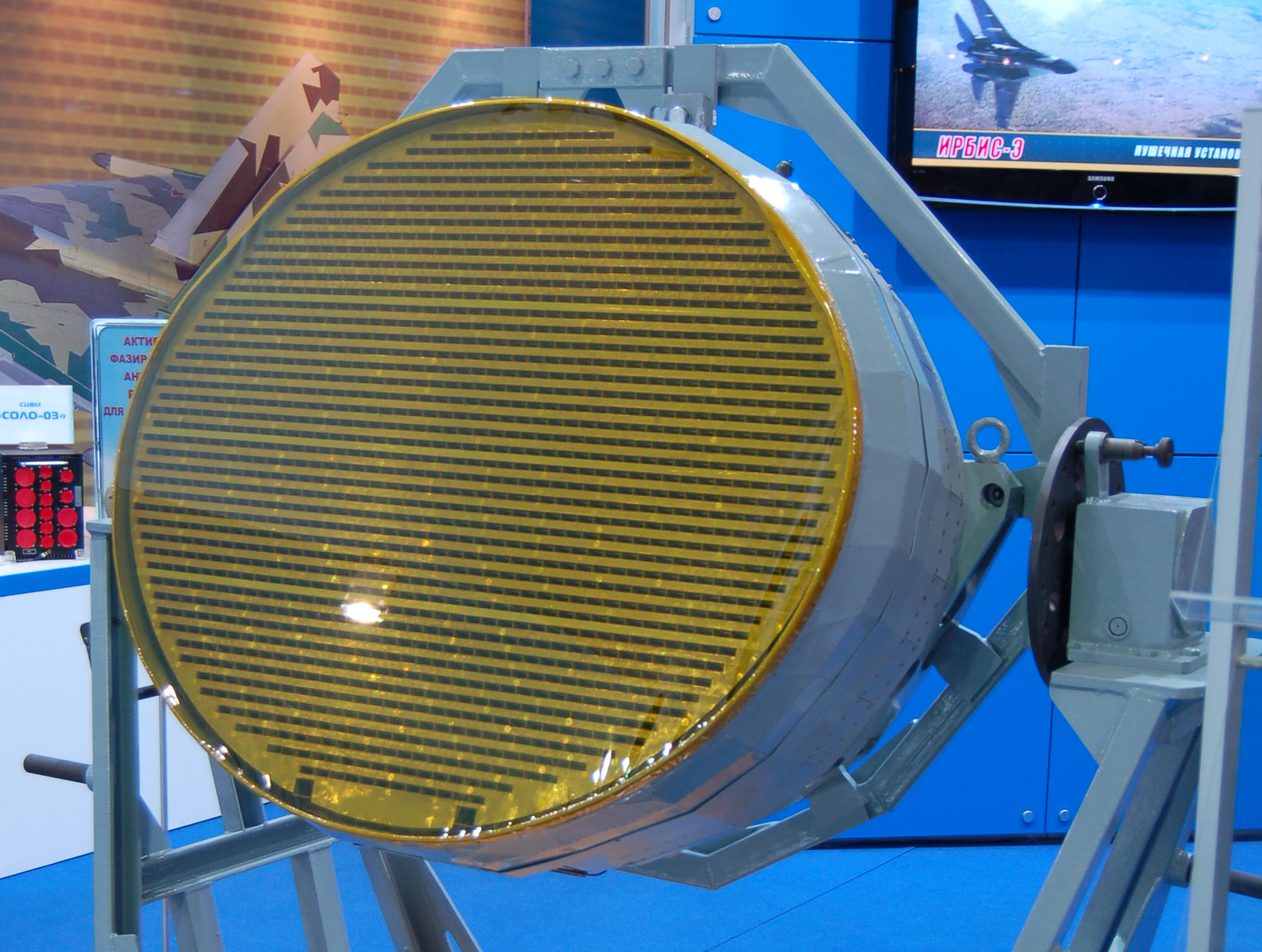 РЛС с АФАР разработки НИИП для ПАК ФА на МАКС-2009Slovenčina: AESA radar pre PAK FA